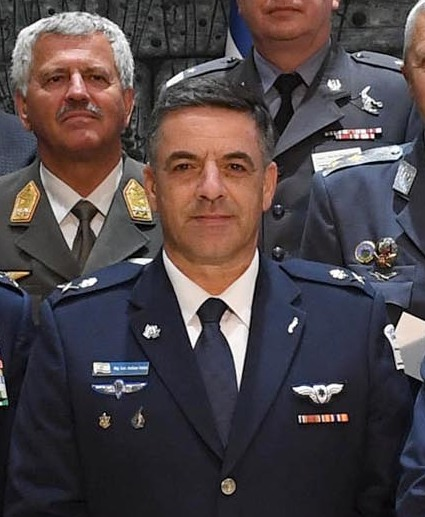 ראובן ריבלין נשיא מדינת ישראל בכנס מפקדי חיילות האוויר מהעולם שהתקיים בירושלים